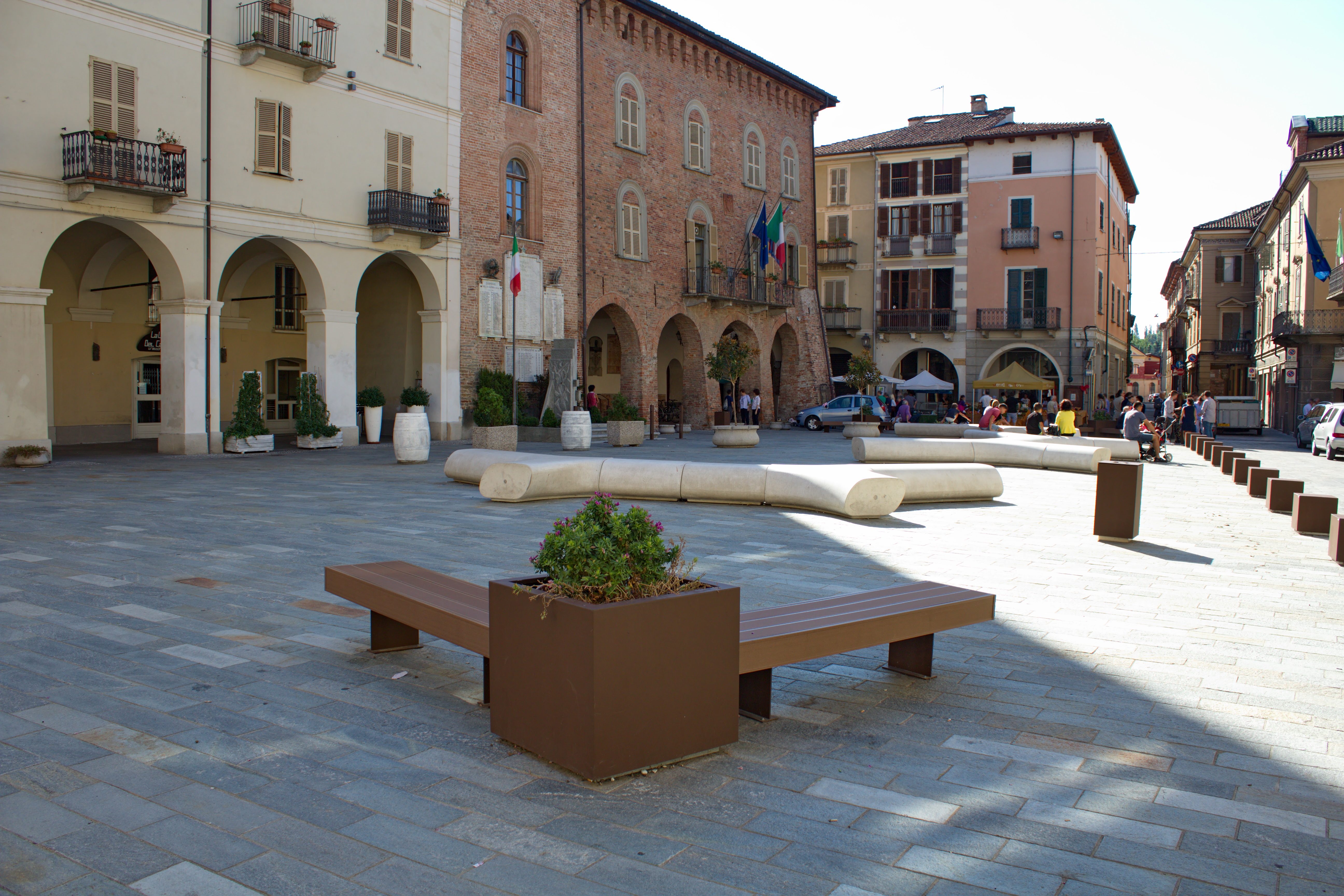 Piazza del Comune di Nizza Monferrato This is a photo of a monument which is part of cultural heritage of Italy.